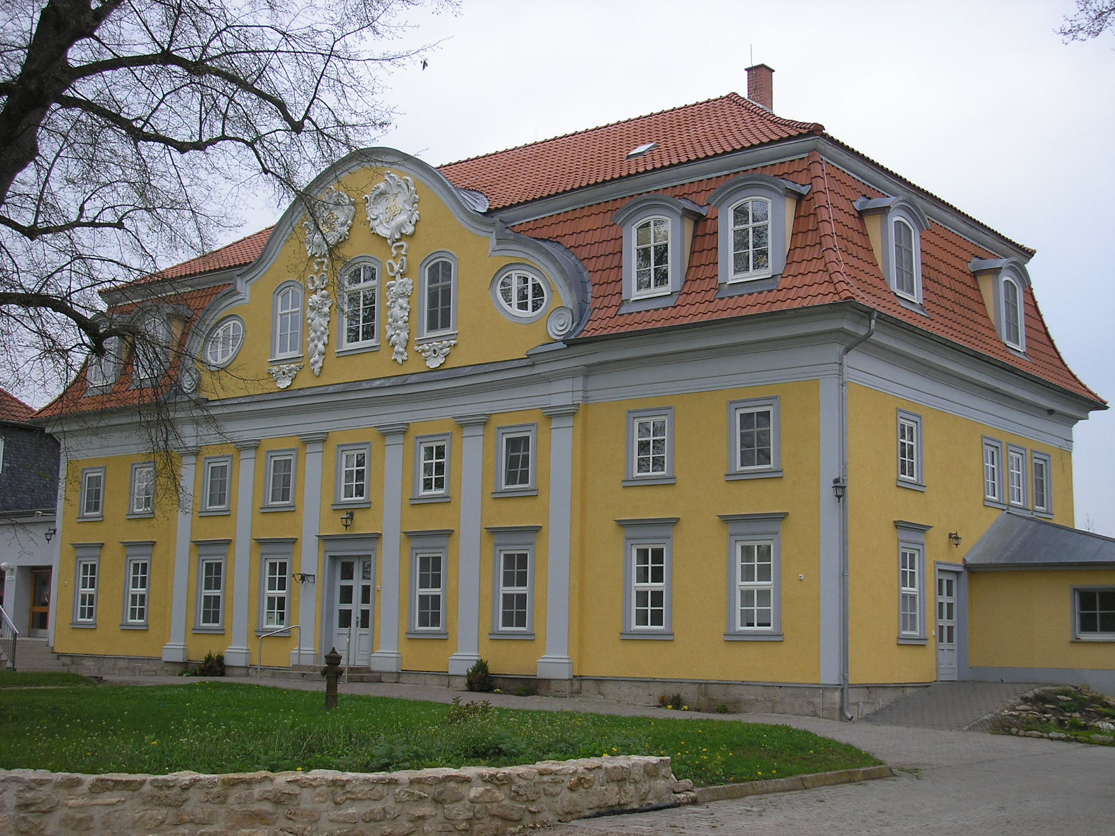 Das Palmenhaus der Schlossanlage in Ebeleben (Thüringen).